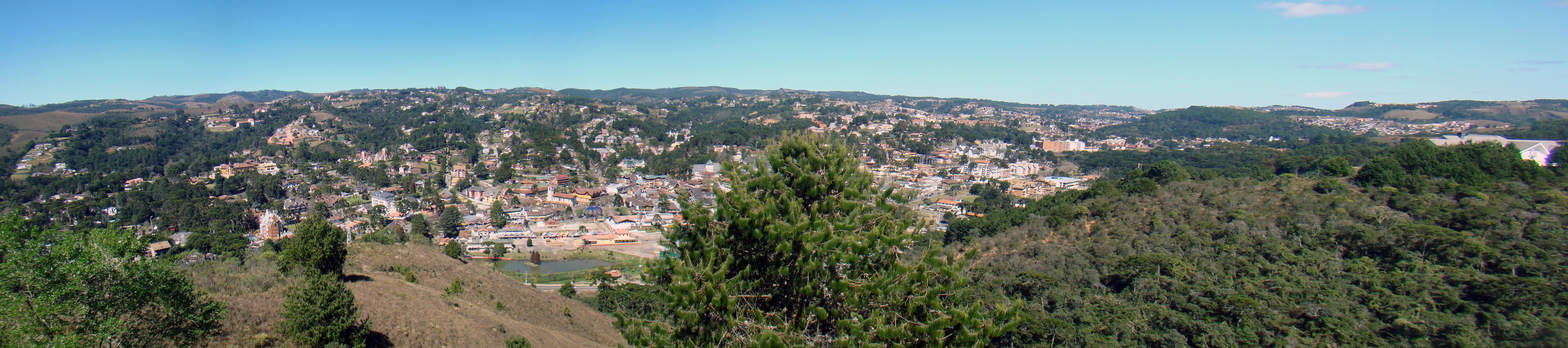 Panorama da cidade de Campos do Jordão, São paulo, Brasil.